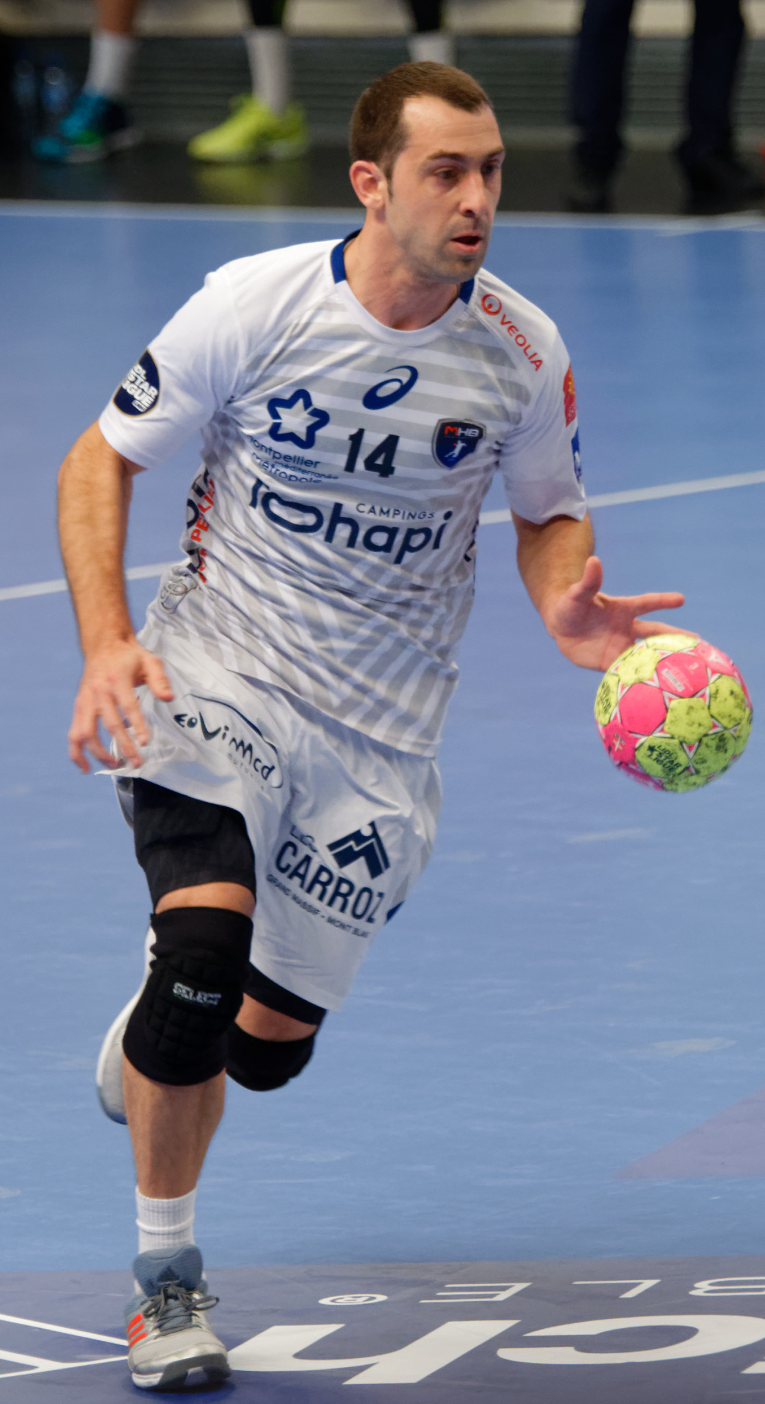 Rencontre de championnat entre le PSG et Montpellier. A Coubertin, le 1er mars 2018.